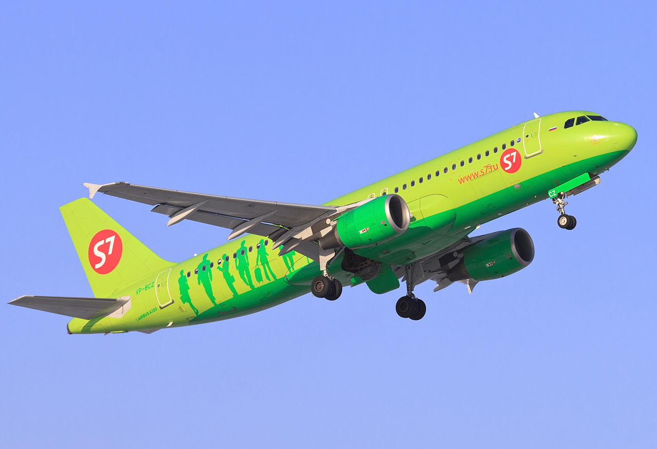 _MG_0063-2